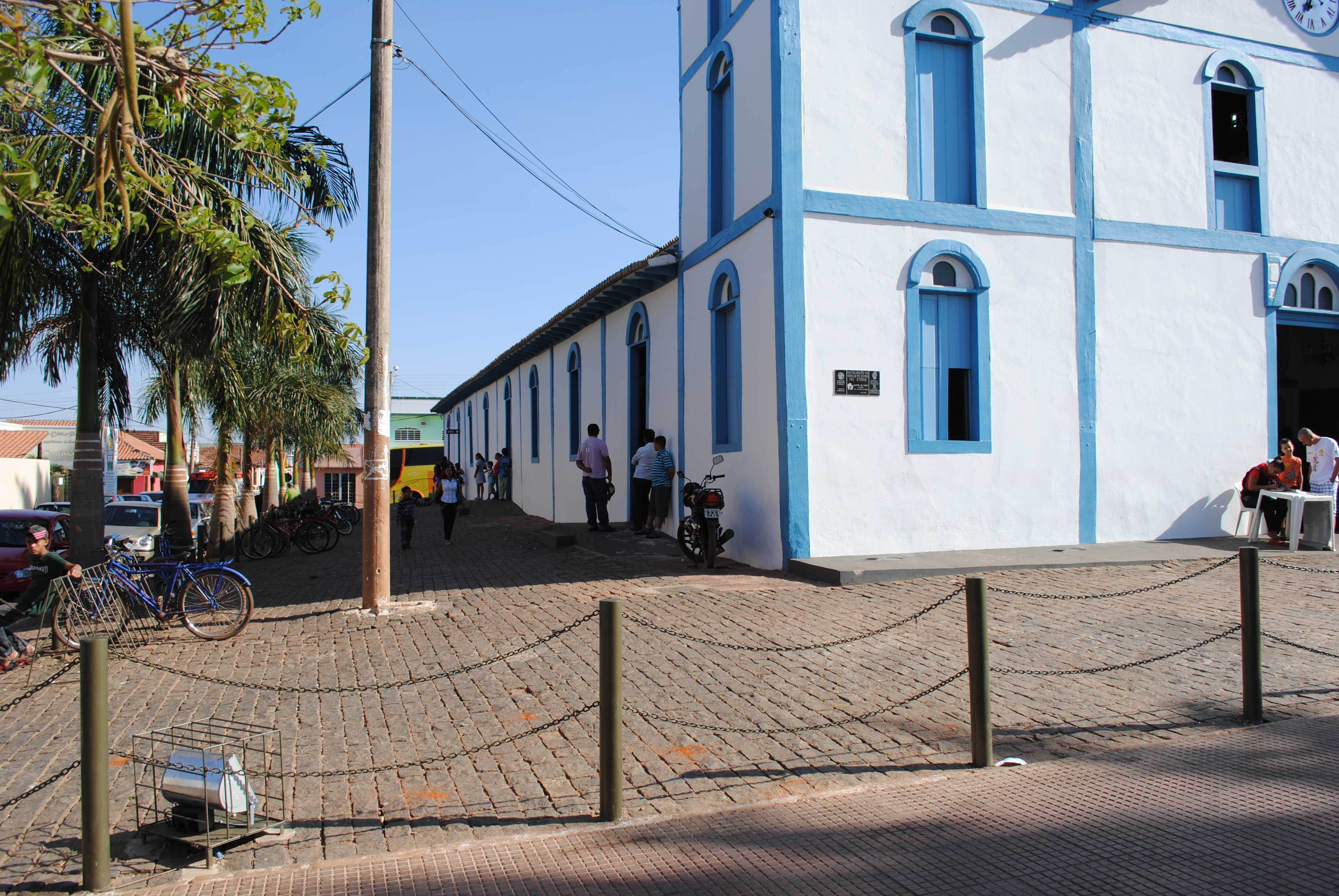 Parte da Igreja Matriz de Trindade, Goiás, Brasil.